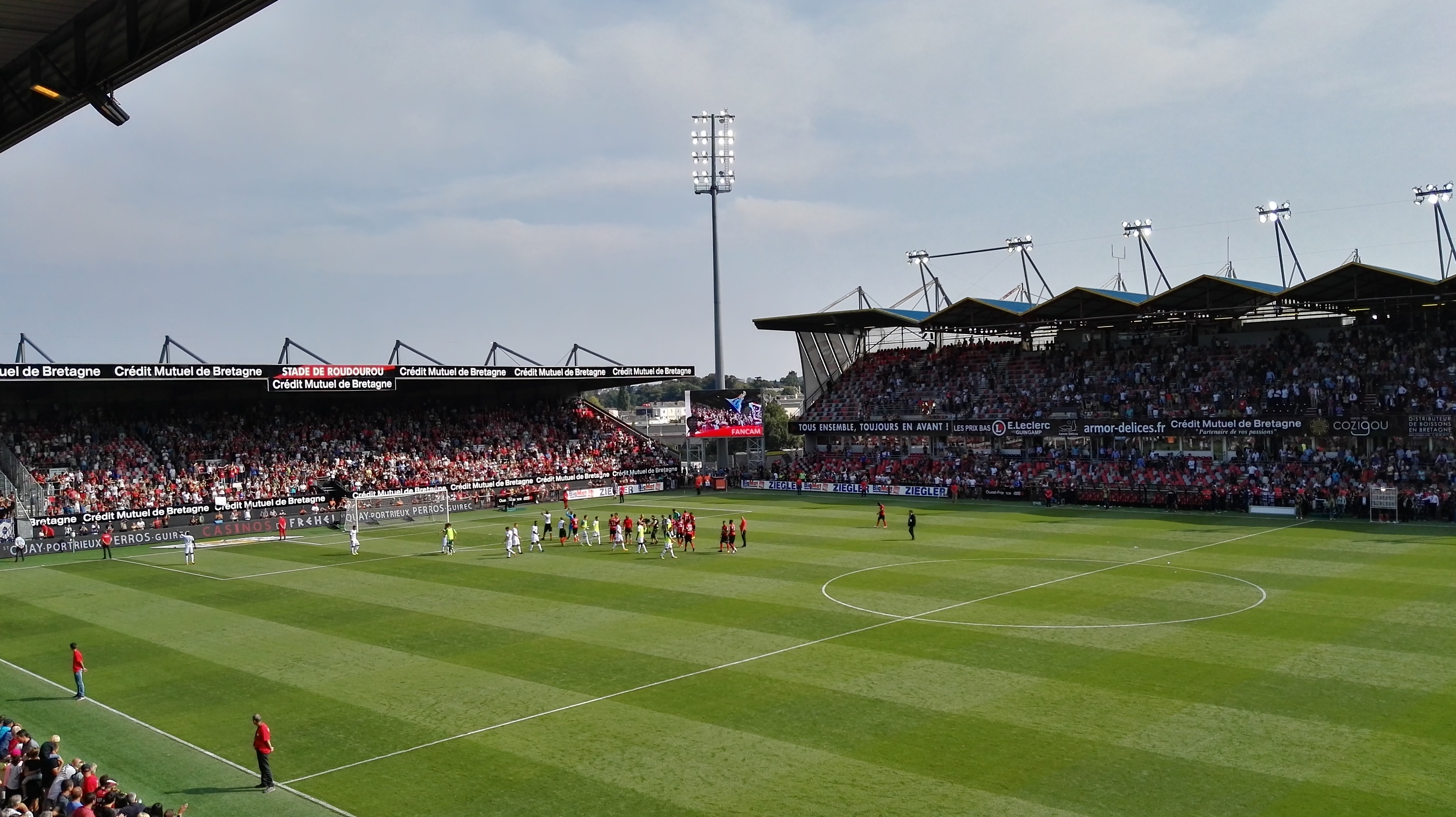 EAG - Strasbourg